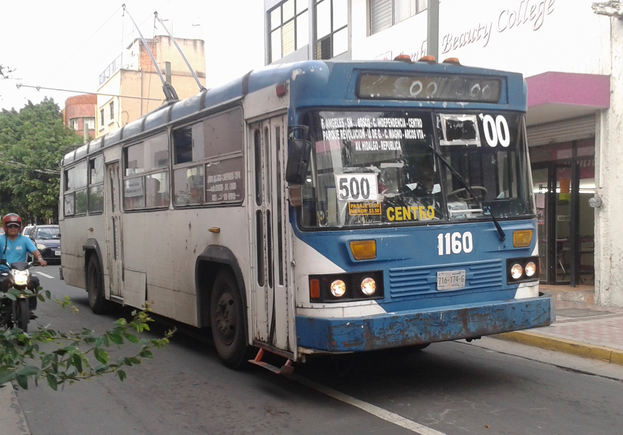 Trolebús de Guadalajara en el año 2013